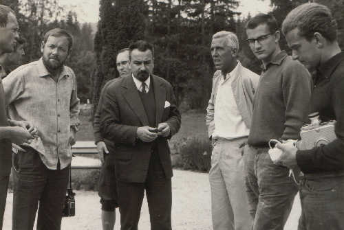 Tatranskí horolezci - Paľo Vavro, Ivan Fiala? Arno Puškáš, Ferko Mrázik, Alexander Luczy, Juraj Weincziller